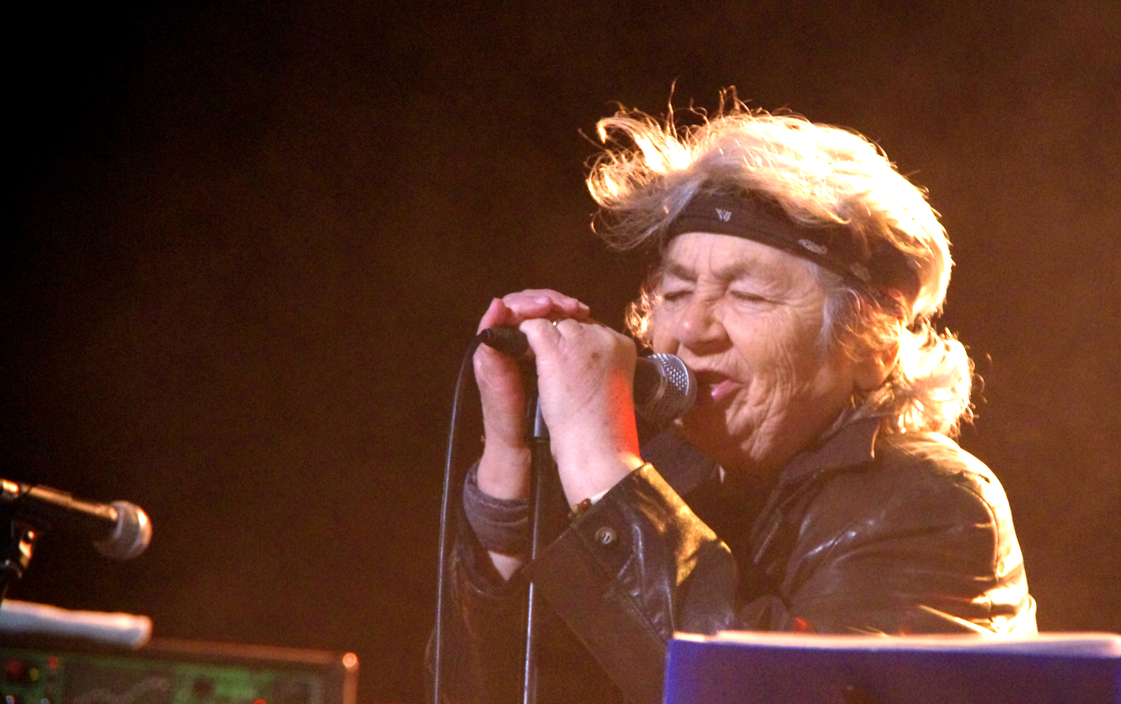 Abbeville (Somme, France) - 17ème édition des "Nuits du Blues" (du 18 au 27 mars 2011). Concert du groupe "Little Bob Blues Bastards", au Théâtre municipal. .